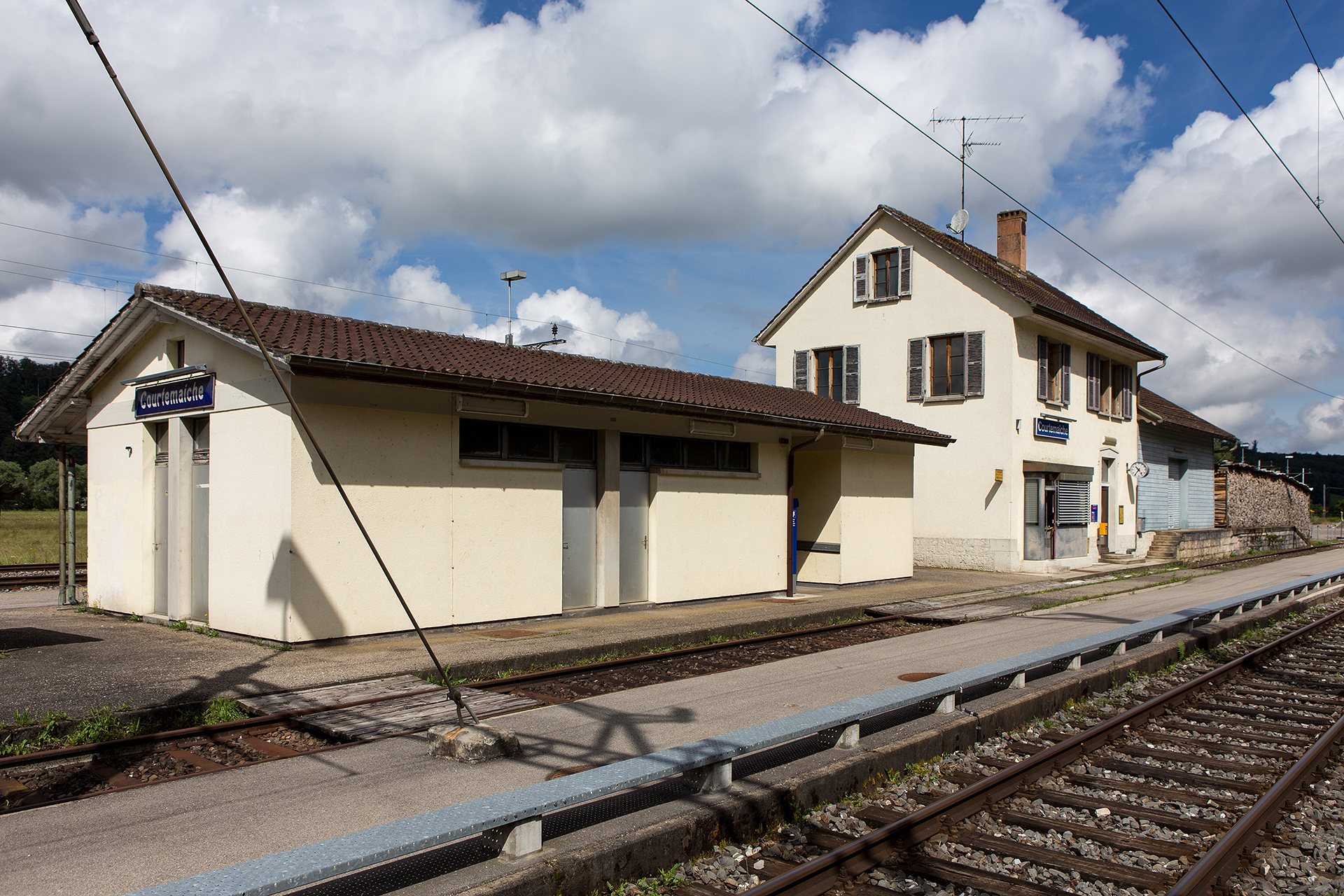 La Gare de CourtemaÎche (JU)